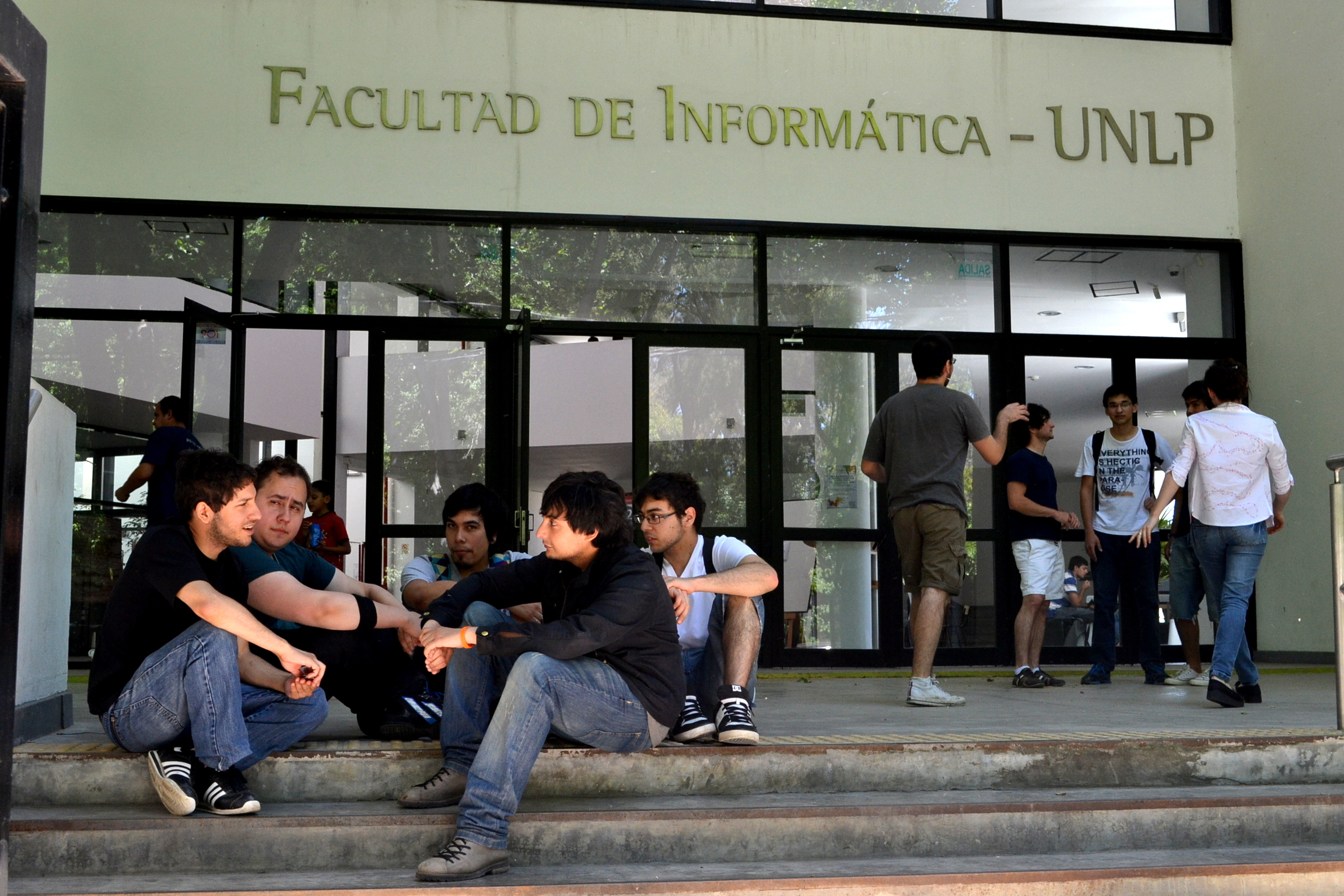 Entrada de la Facultad de Informática UNLP